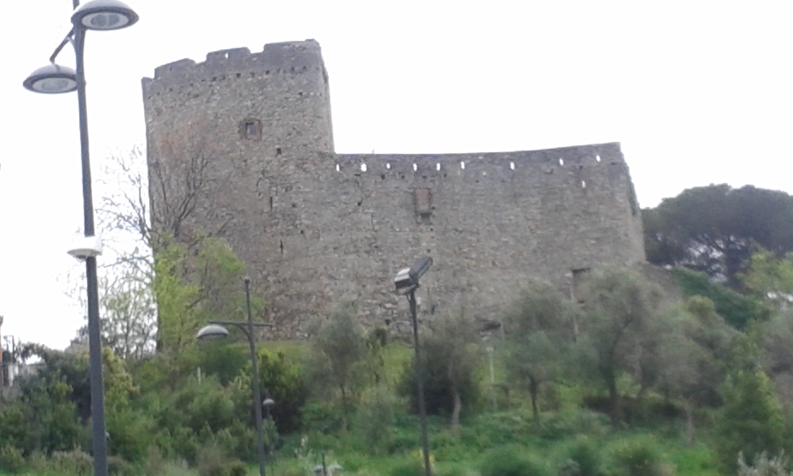 RRestaĵoj de la kastelo de Chiavari